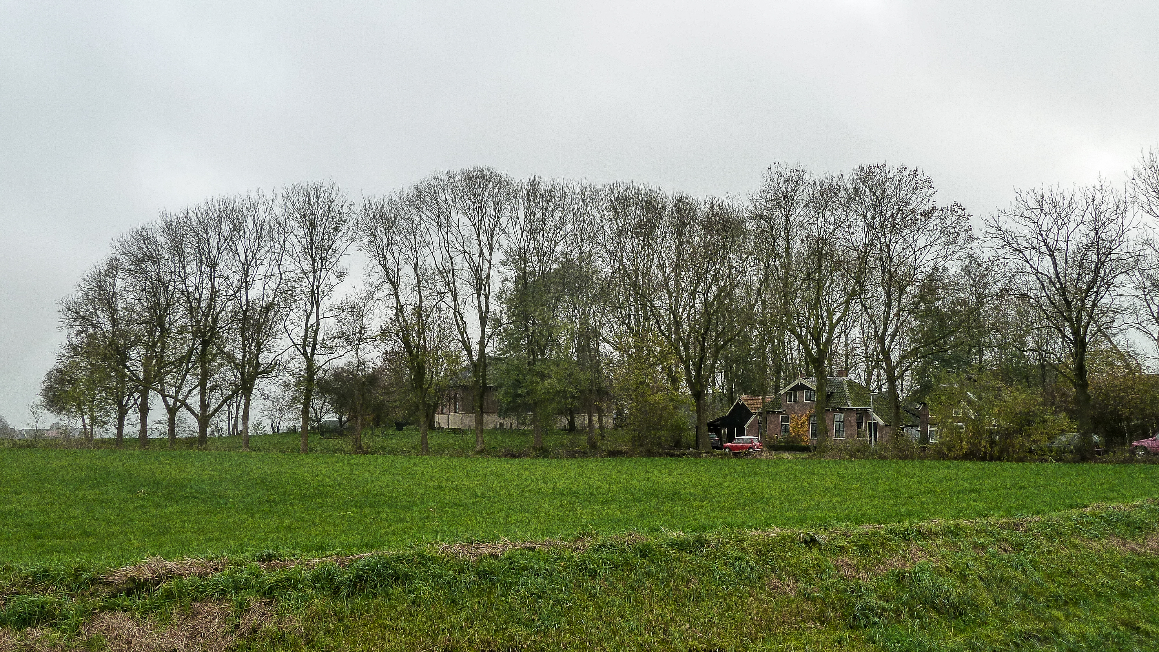 Wierde van Wittewierum